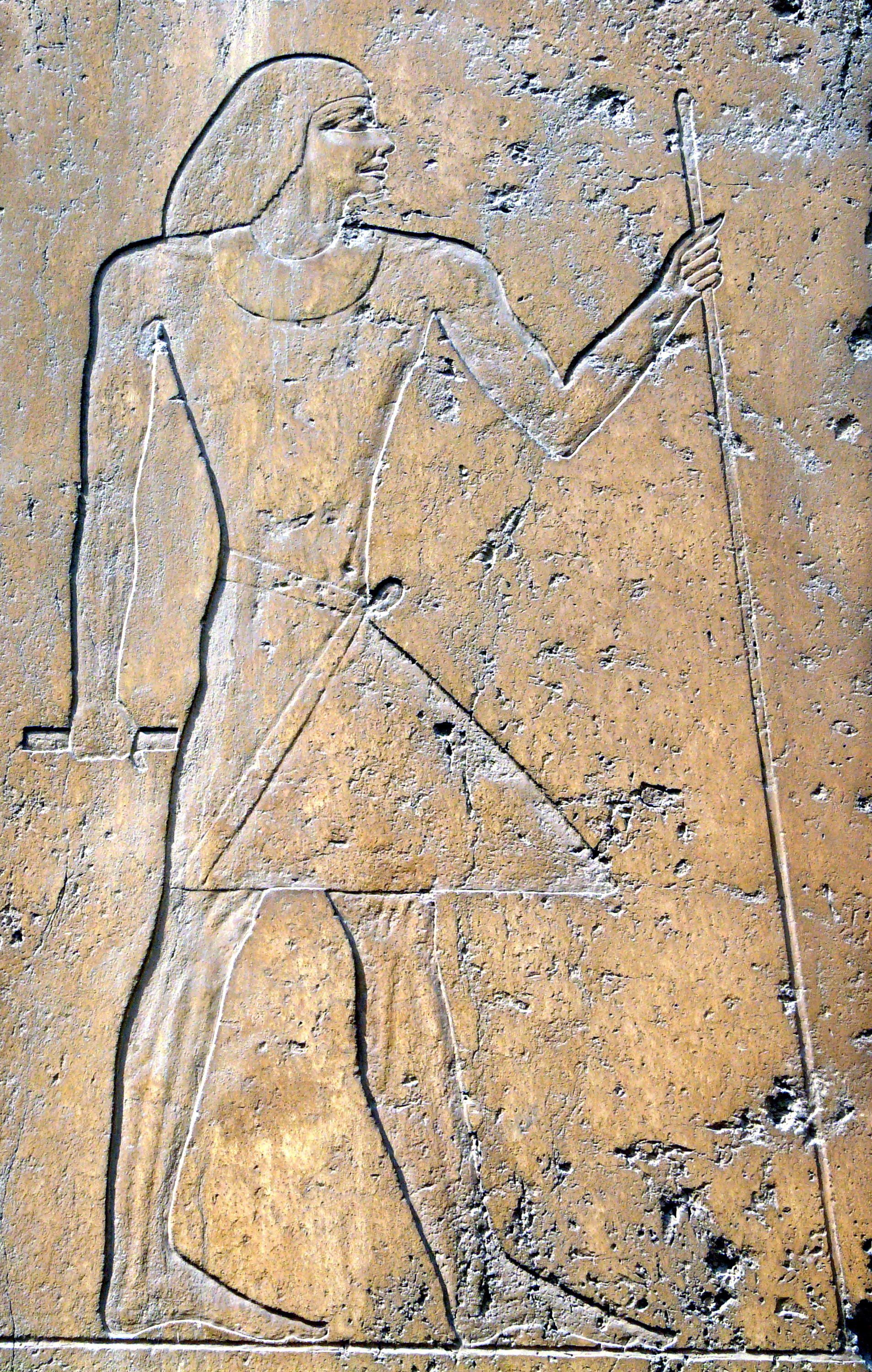 Représentation de Ptahchepsès (Ve dynastie) sur une colonne de la cour centrale de son mastaba - Abousir